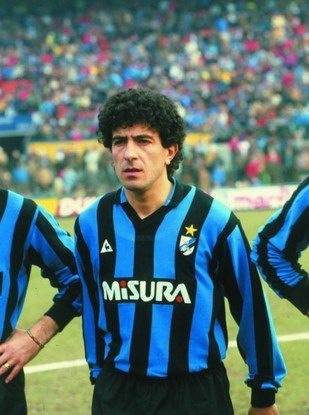 Il calciatore italiano Gianfranco Matteoli all'Inter nella seconda metà degli anni 1980. Licensing Matteoli, Gianfranco Categoria:Immagini di Gianfranco Matteoli